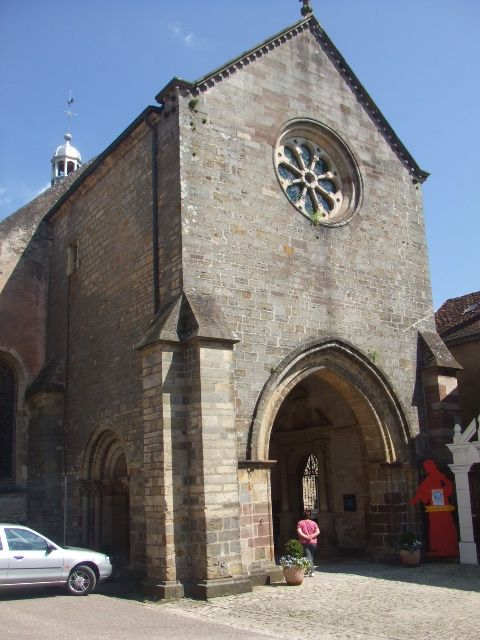 Faverney, Haute-Saône, France Église abbatiale de Faverney